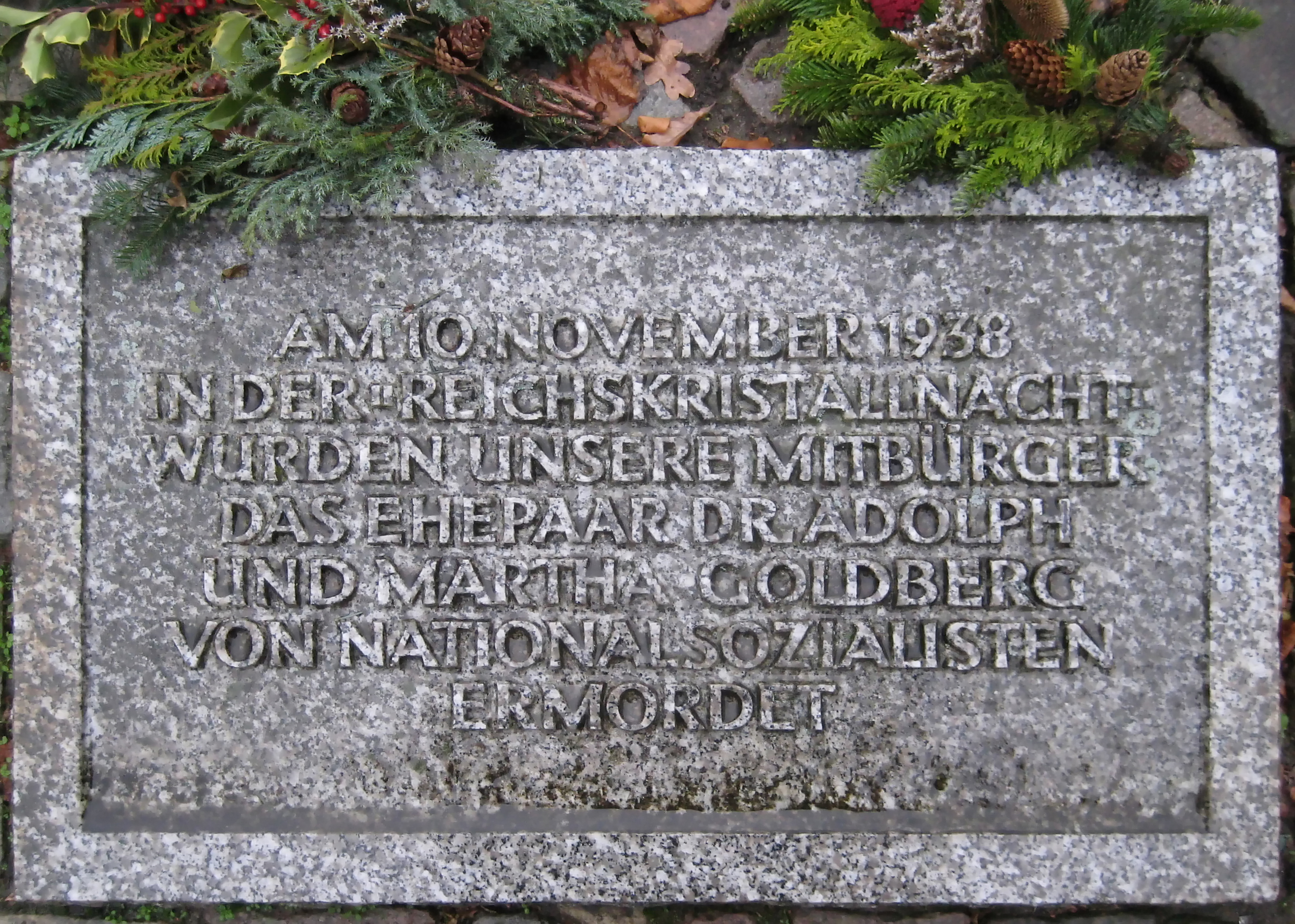 Gedenkstein für das Ehepaar Dr. Adolph Goldberg und Martha Goldberg in Bremen-Burgdamm, Goldbergplatz (an der Bremerhavener Heerstraße)